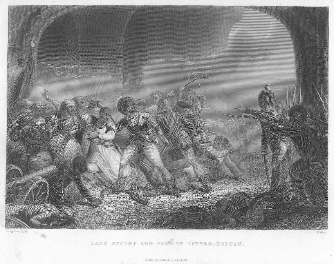 Samtida brittisk avbildning av Tippos Sahibs fall på slagfältet.